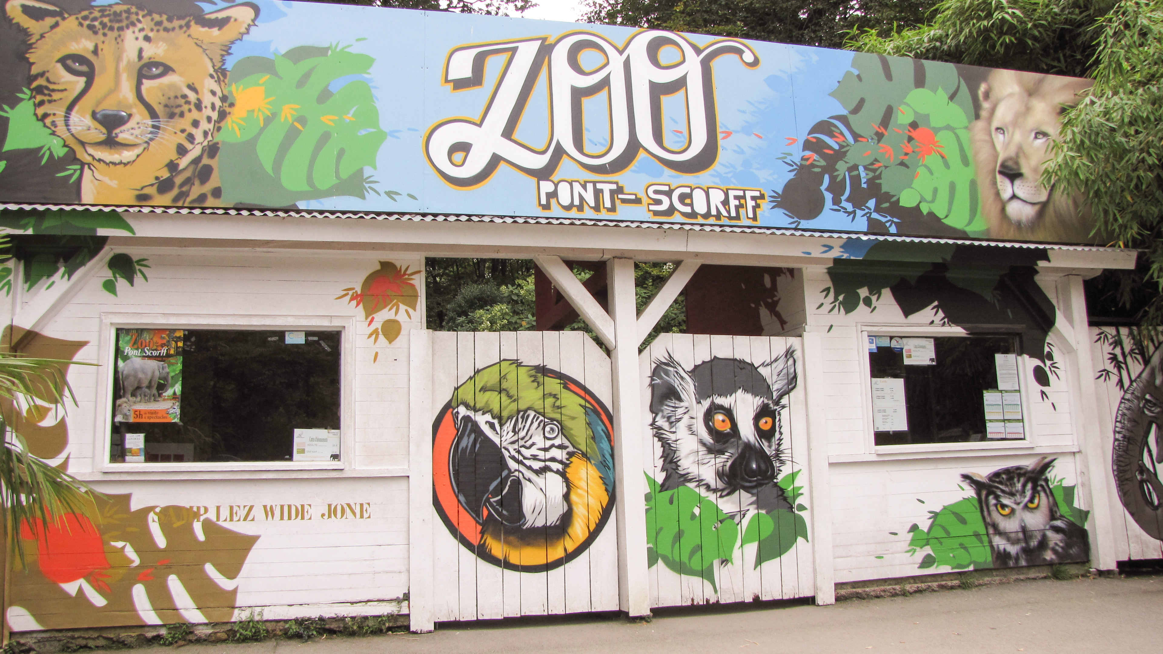 Zoo de Pont-Scorff - Entrée